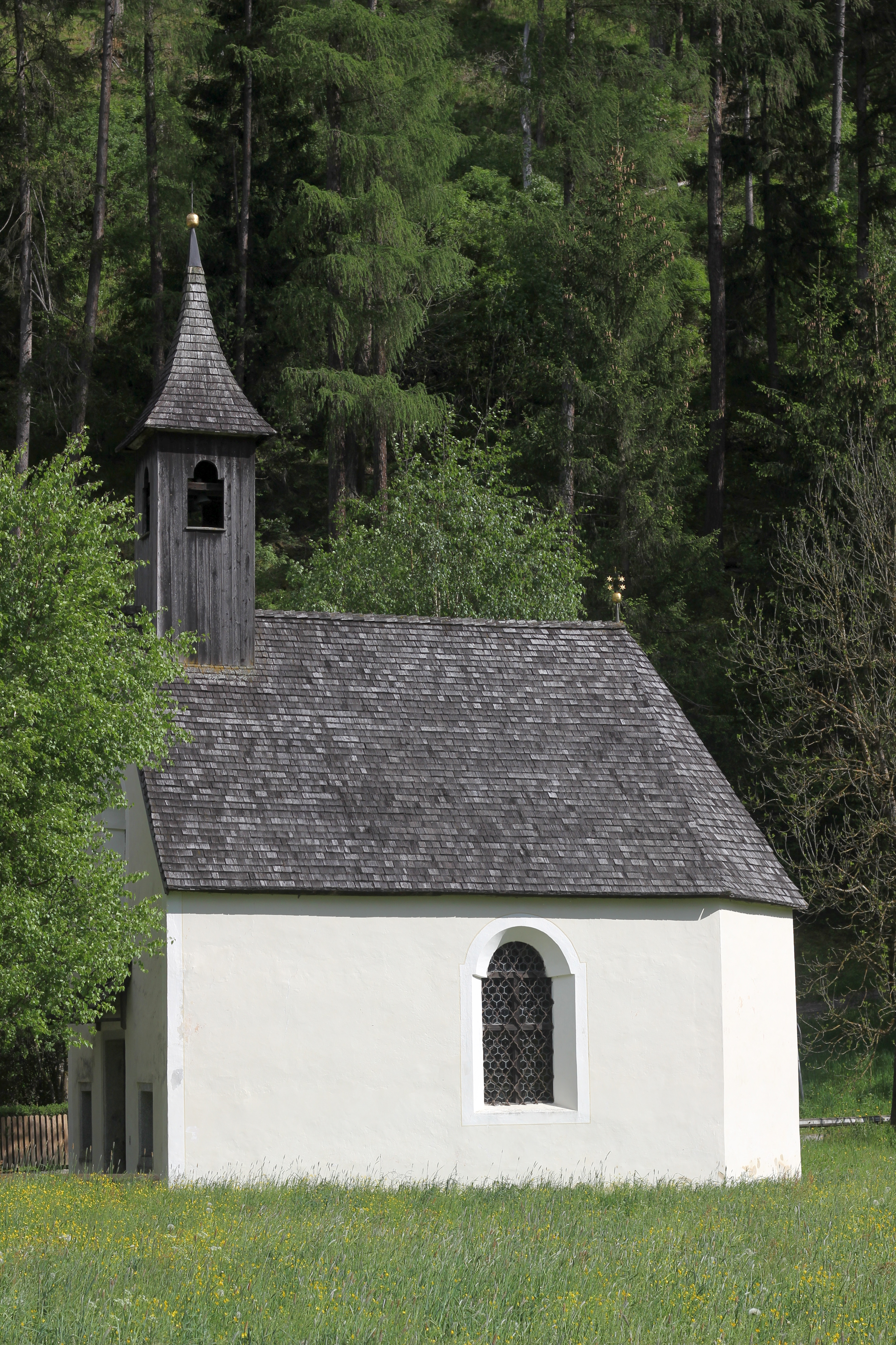 St.-Johannes-Nepomuk-Kapelle mit Umfriedung in Bad Winkel, Sand in Taufers